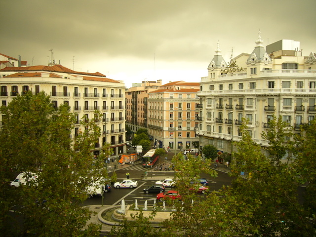 Viser diverse bokomplekser og andre bygninger i Chamberí-distriktet i Madrid.